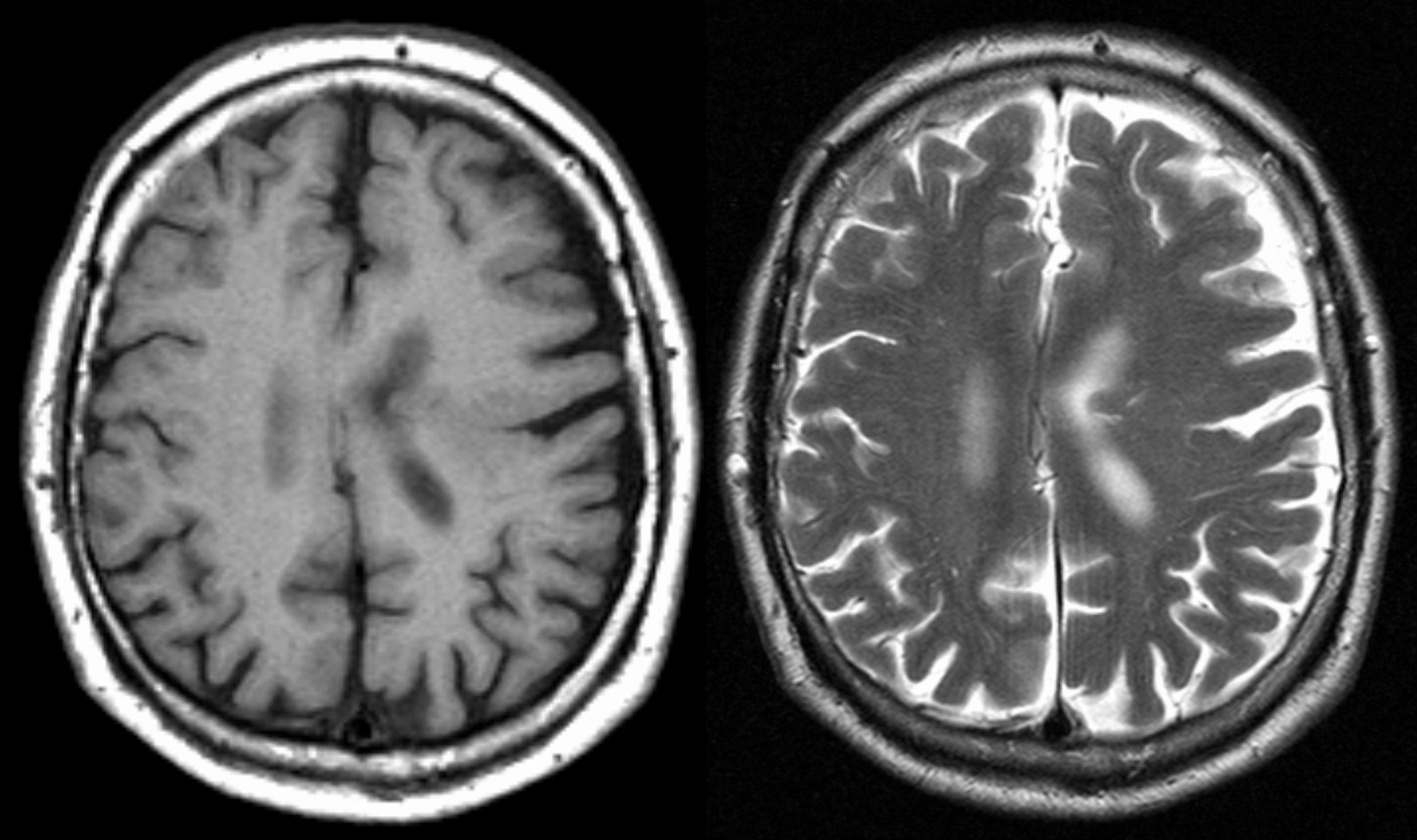 Schizenzephalie in der MRT bei einem 68 jährigen Mann. Closed lip-Form mit nur schmaler Spaltbildung. Links T1-, rechts T2-gewichtetes Bild.